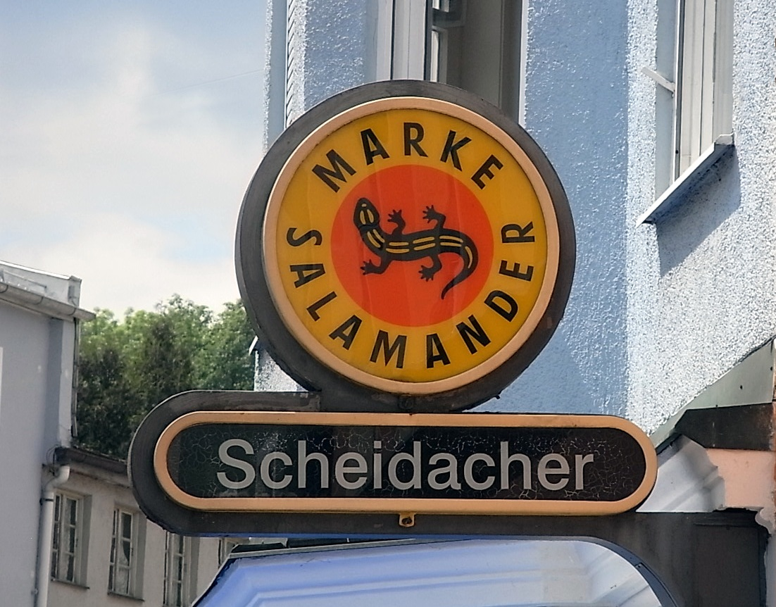 Firmenschild eines Schuhgeschäfts in Wasserburg am Inn